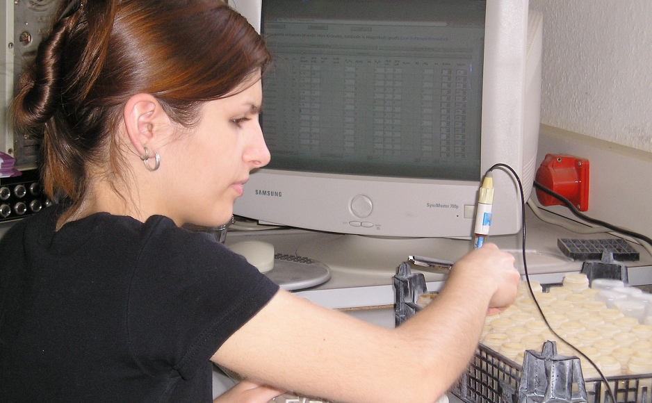 Elektrometrische Messung des pH-Wertes in Bodenproben